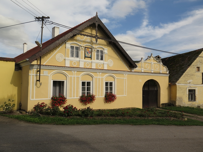 Venkovská usedlost, Třešňový Újezdec 22, Třešňový Újezdec.